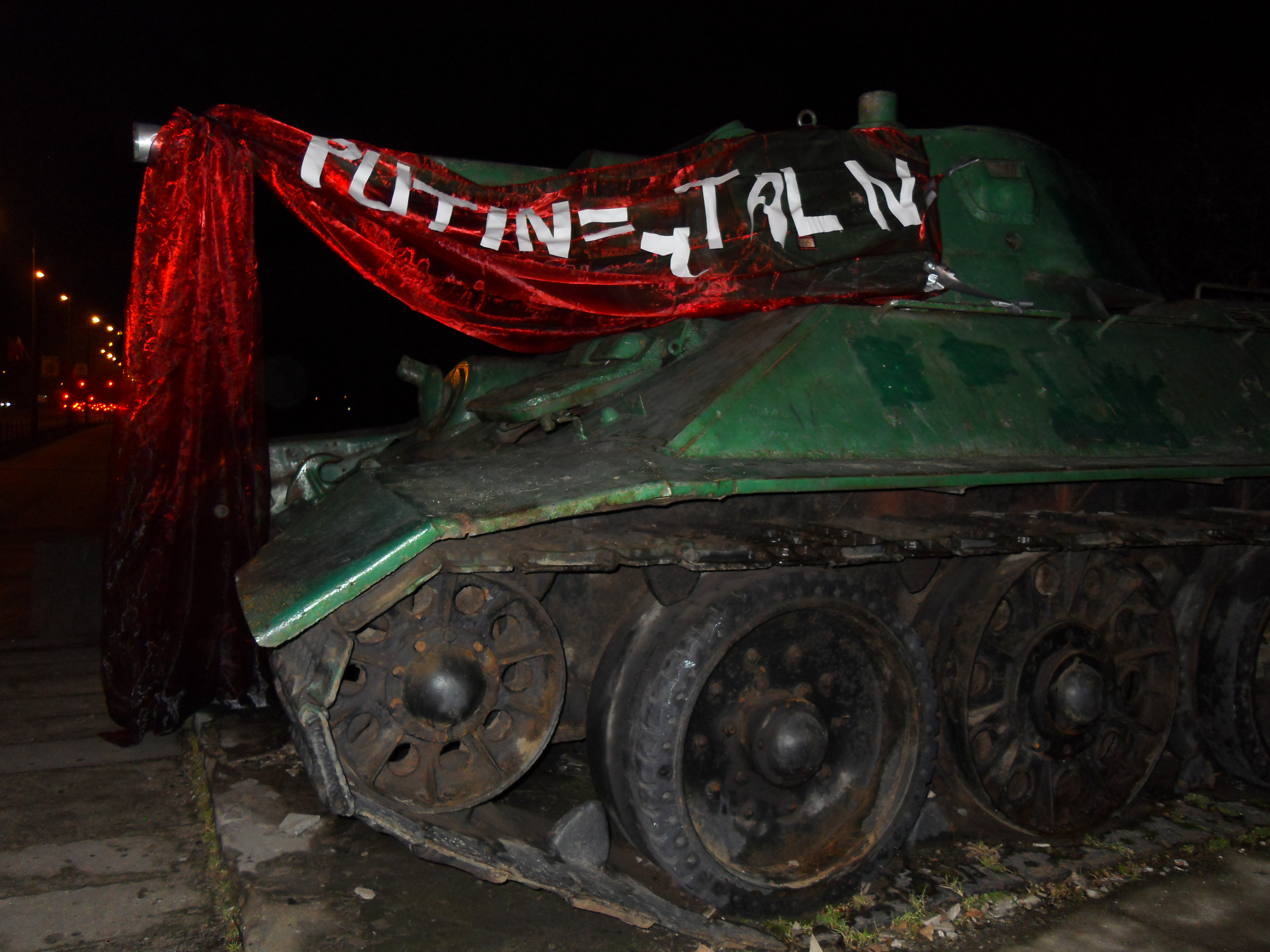 Gdańsk Aniołki, al. Zwycięstwa. Czołg, "Putin = Stalin".